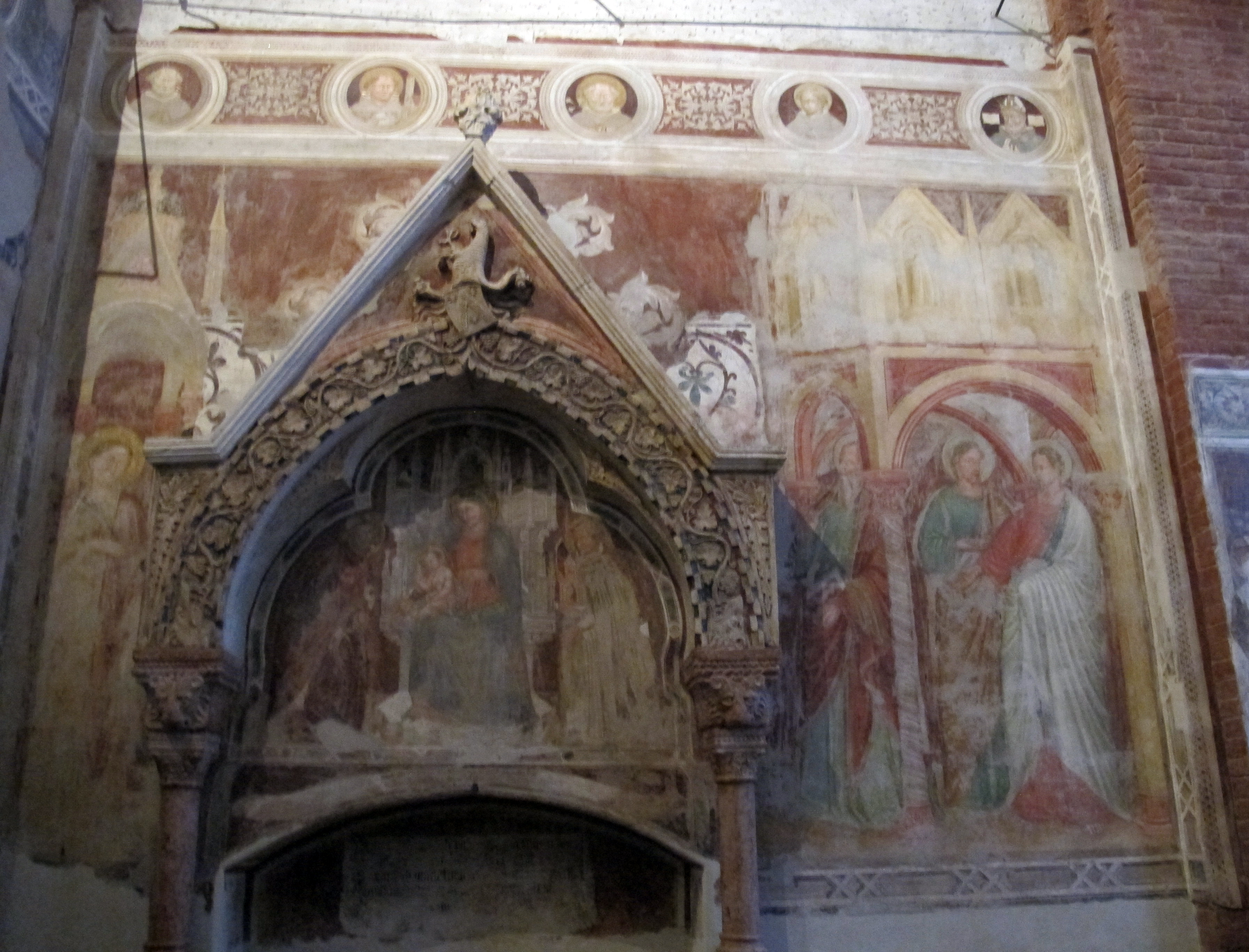 Santa Anastasia (Verona)